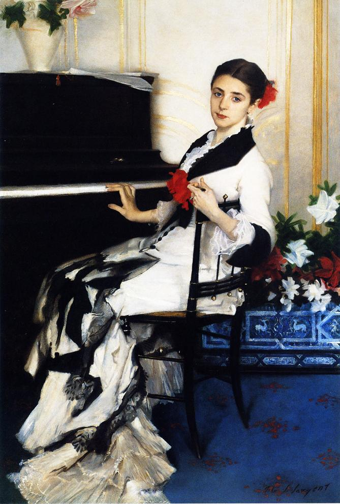 Madame Ramon Subercaseaux (nee Amalia Errazuriz y Urmeneta)